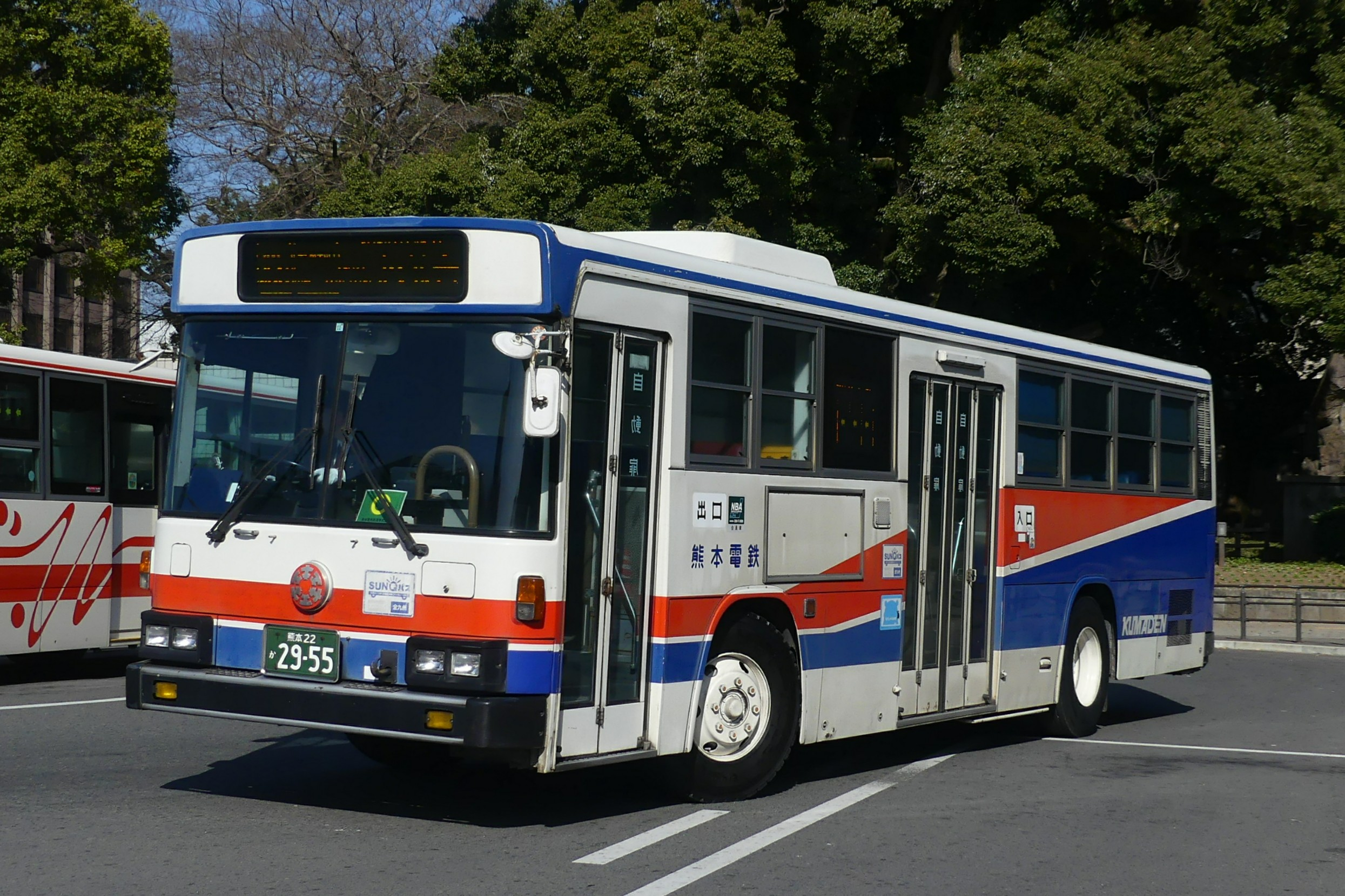 熊本電鉄バス